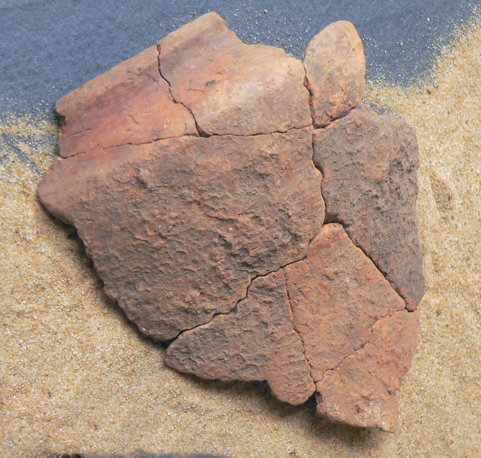 Keramikfragmente als Fund bei der Ausgrabung im Jahre 2011 der eisenzeitlichen Siedlung bei Bantorf, ausgestellt in einer Ausstellung im Rathaus Barsinghausen im September 2012